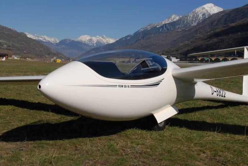 ASW 28-18 "D-6822" auf dem Flugplatz Aosta Heute aufgrund des einbaus eines Klapptriebwerks umbenannt in "D-KAXF"